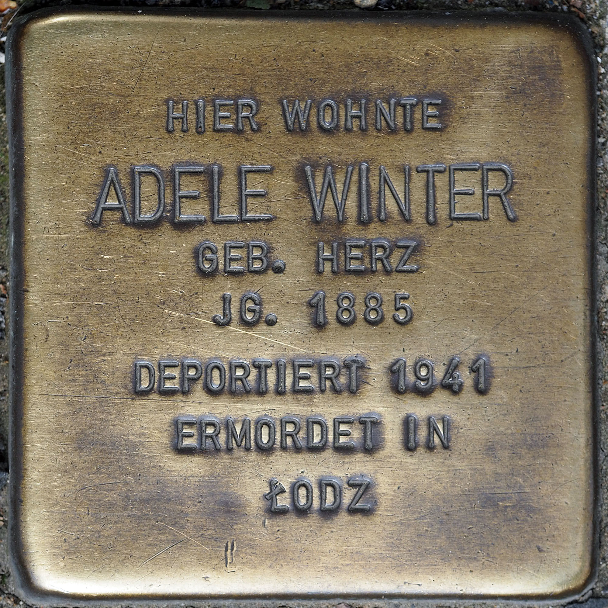 Stolpersteine MG: Winter, Adele